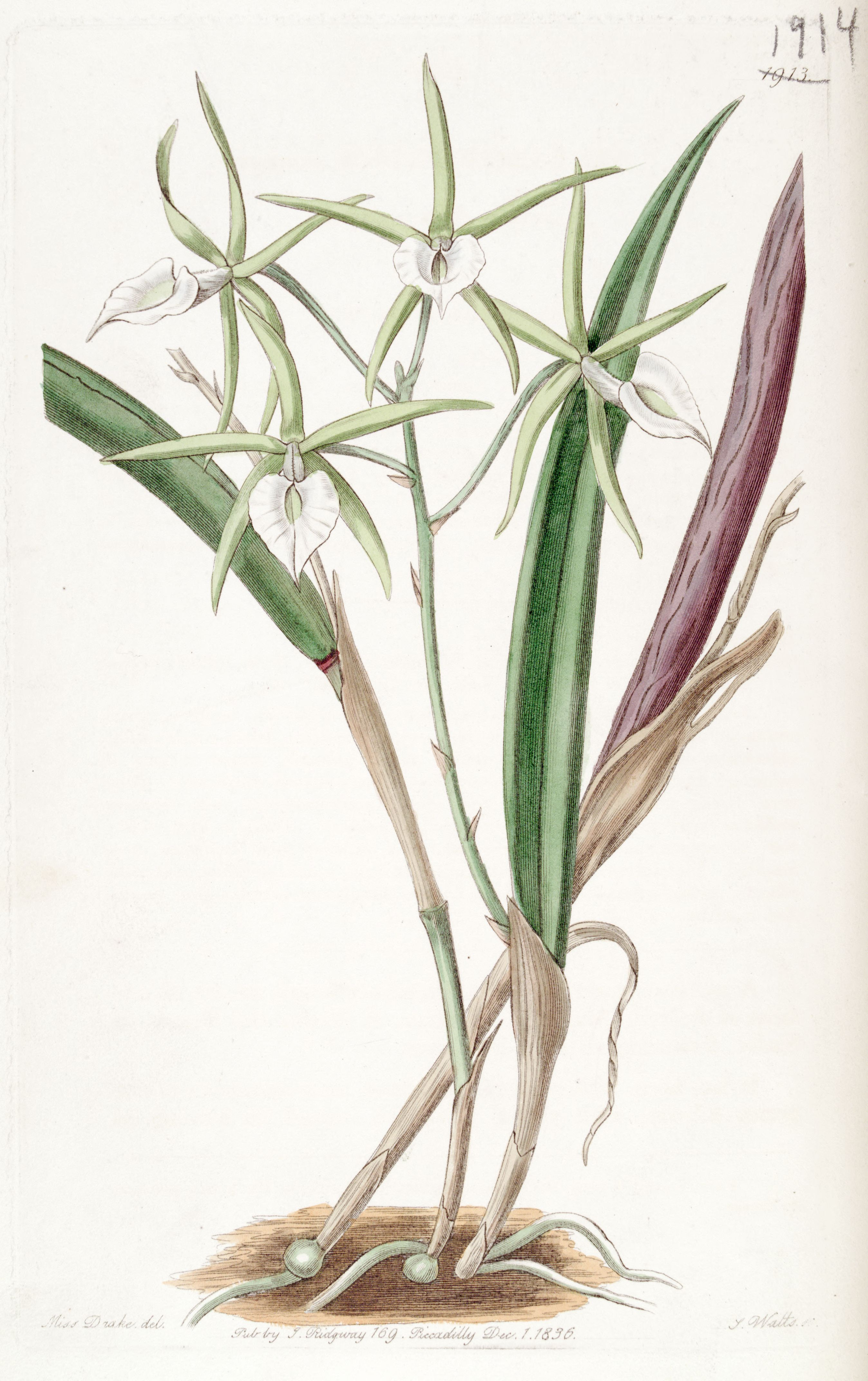 Brassavola subulifolia (as syn. Brassavola cordata)